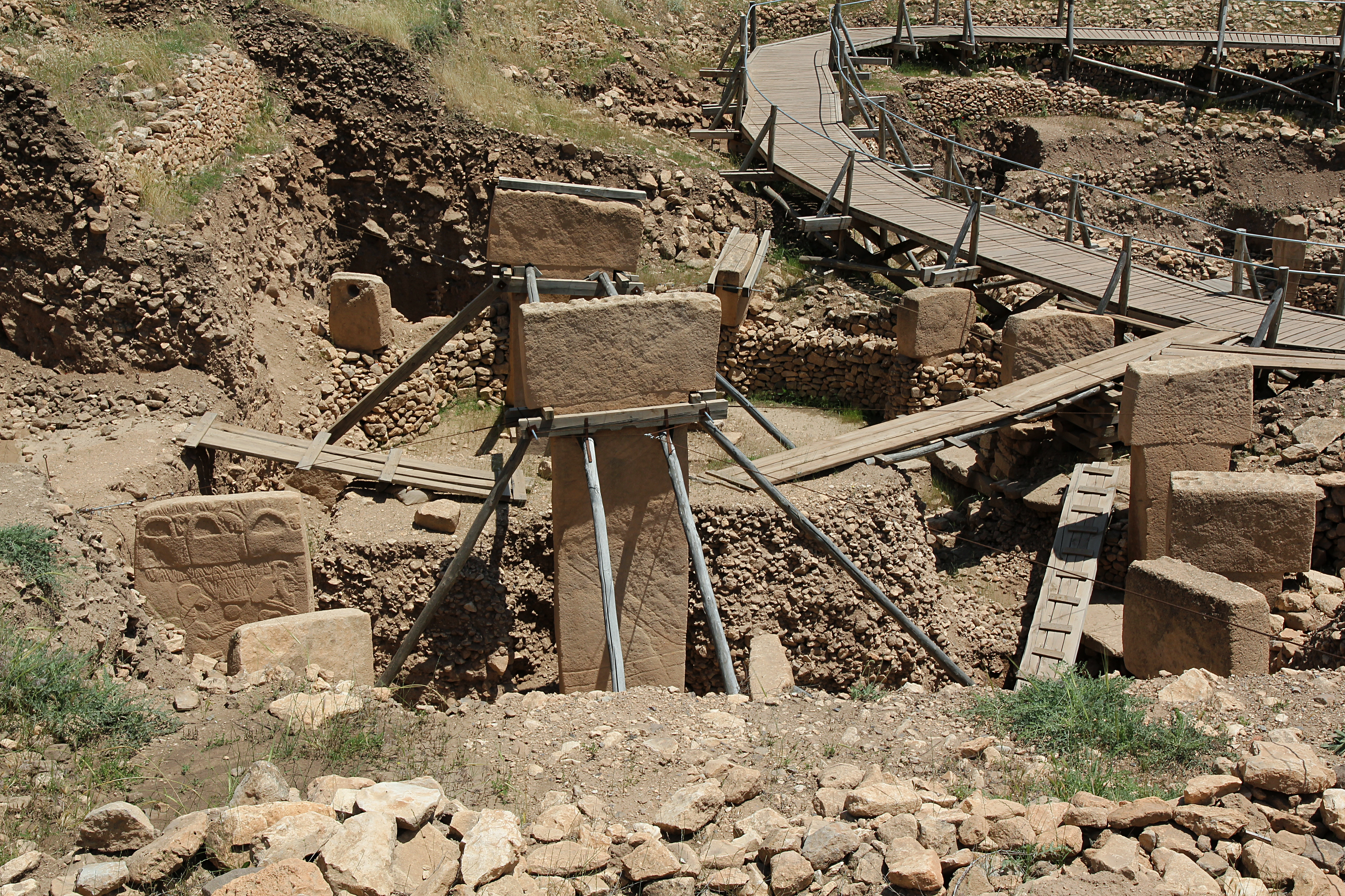 Göbekli Tepe, Siedlungshügel bei Şanlıurfa, Südosttürkei, Anlage D von Westen